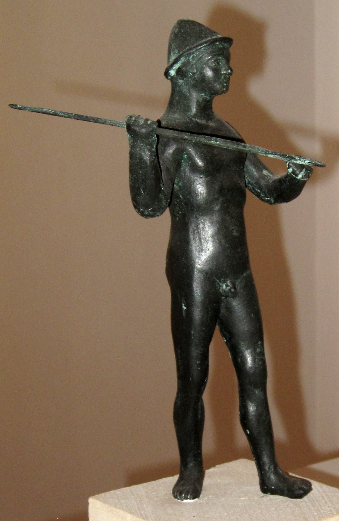 Mars Balearicus, Kopie einer Kriegerstatue aus Son Favar (Gemeinde Capdepera) aus dem 4. bis 3. Jahrhundert v. Chr., im Regionalmuseum von Artà (Museu Regional d’Artà), Gemeinde Artà, Mallorca, Spanien